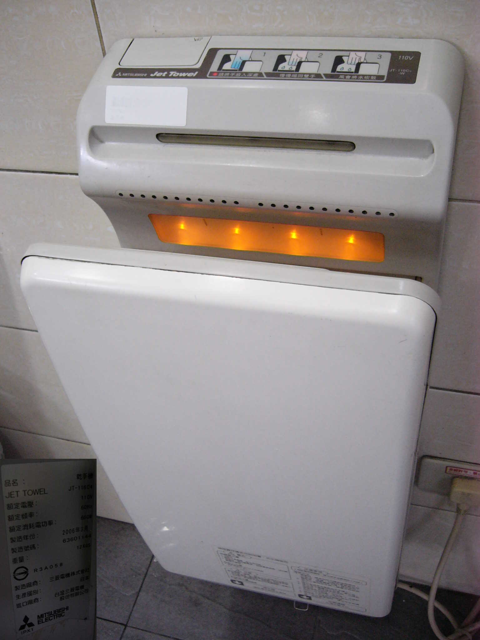 三菱電機於2006年3月製造的JT-116C4乾手機